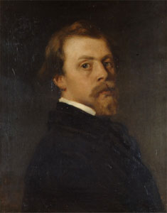 Brustbild eines Mannes mit halblangem rötlichen Haar und Spitzbart. Oberkörper im Profil, der Kopf nach rechts dem Beschauer zugewandt. Rock und Halsbinde sind schwarz, vom Hemd ist nur ein schmaler Streifen sichtbar.